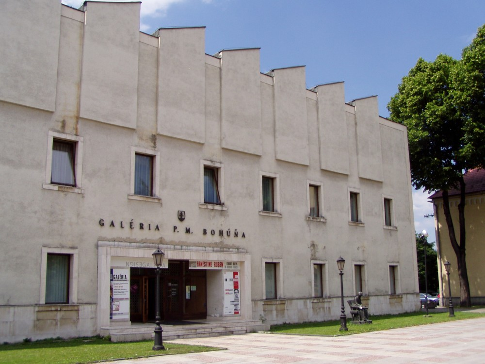 Galéria Petra Michala Bohúňa